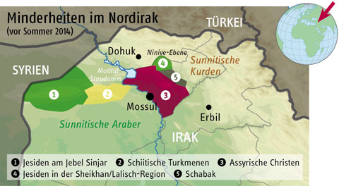 Minderheiten im Nordirak